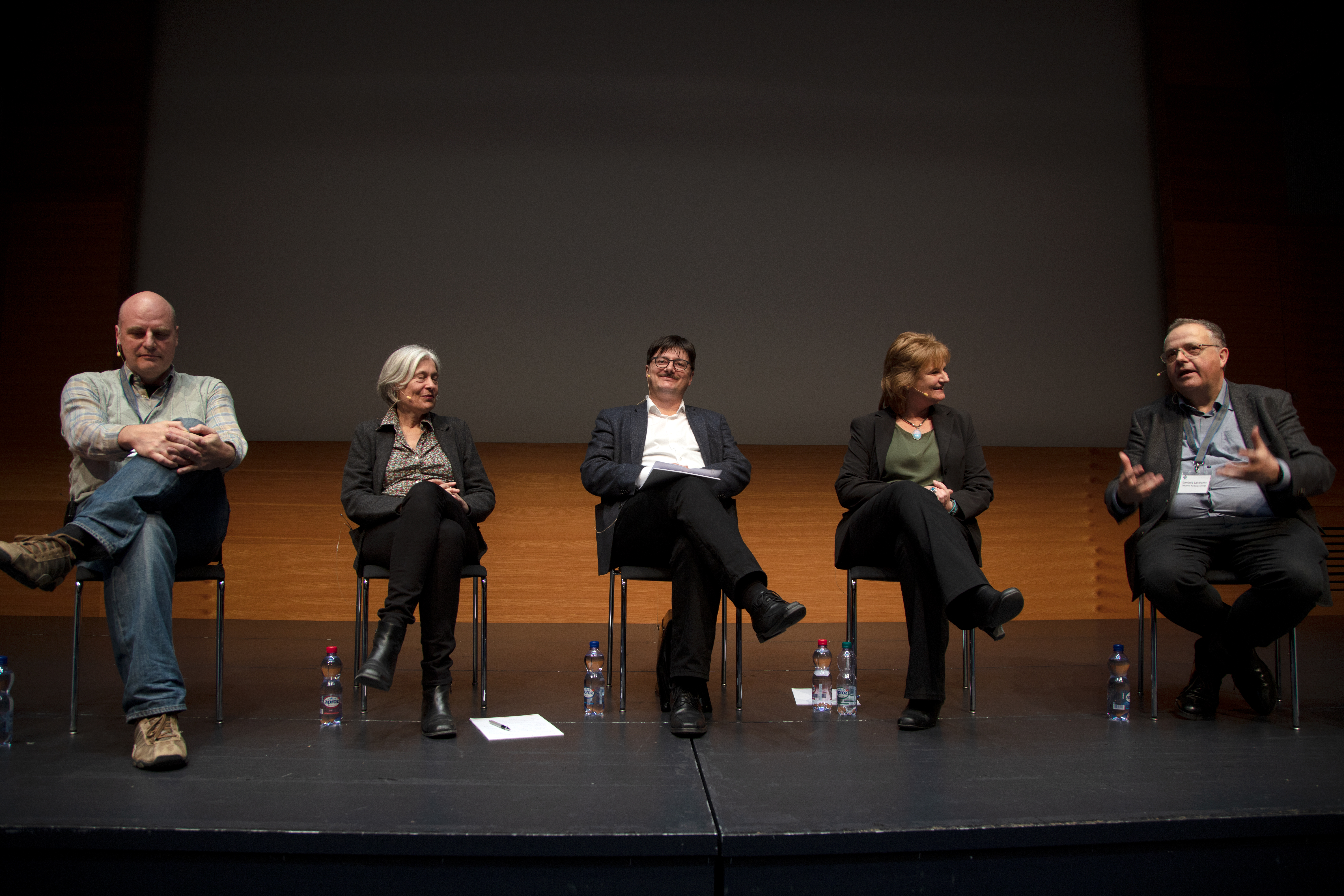 Die GLAM-Podiumsdiskusion am 13.04.2018 zum Thema "Private und öffentliche Archive und ihre Bedeutung für Wikipedia"